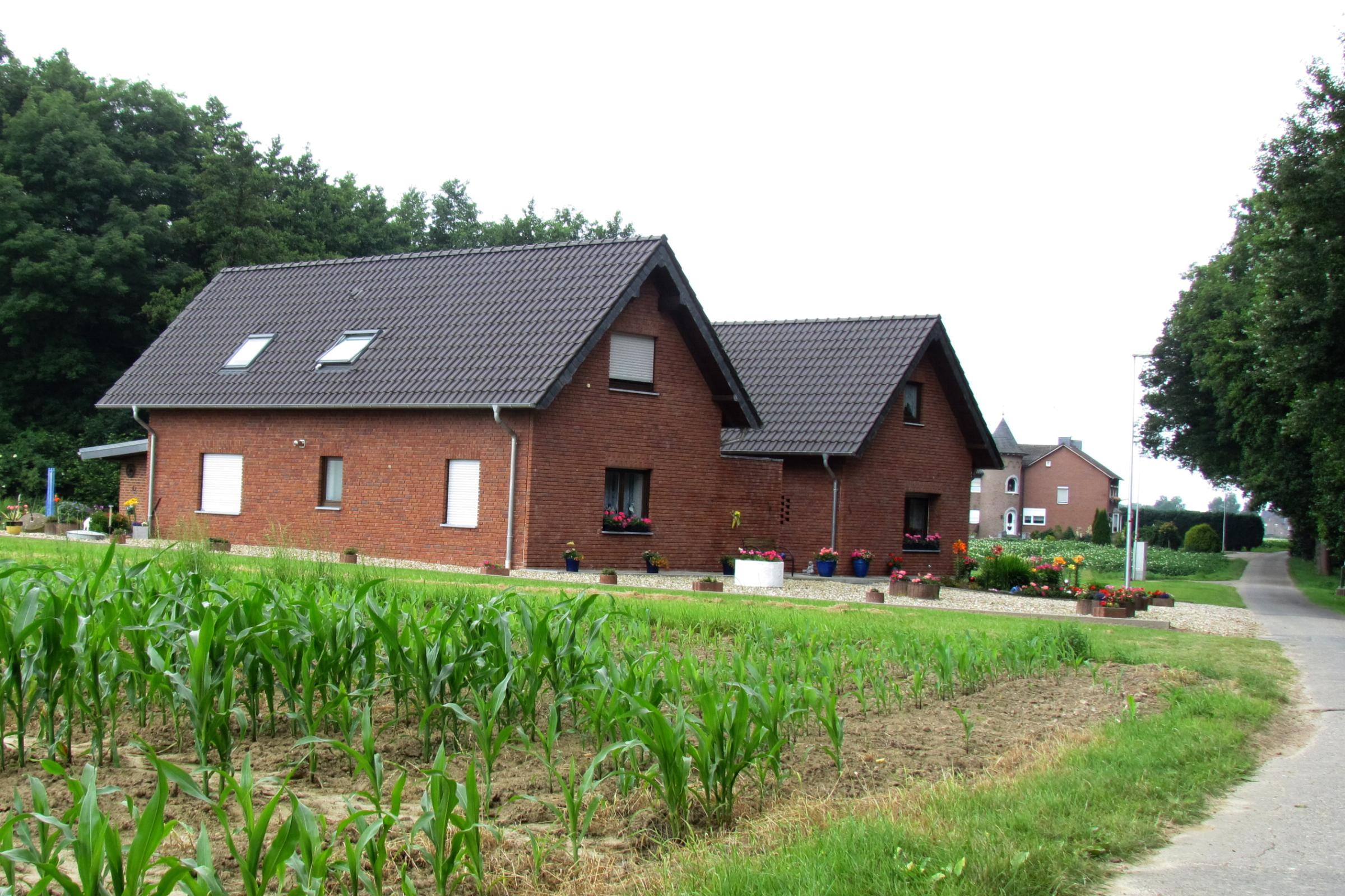 Dieck Ortslage